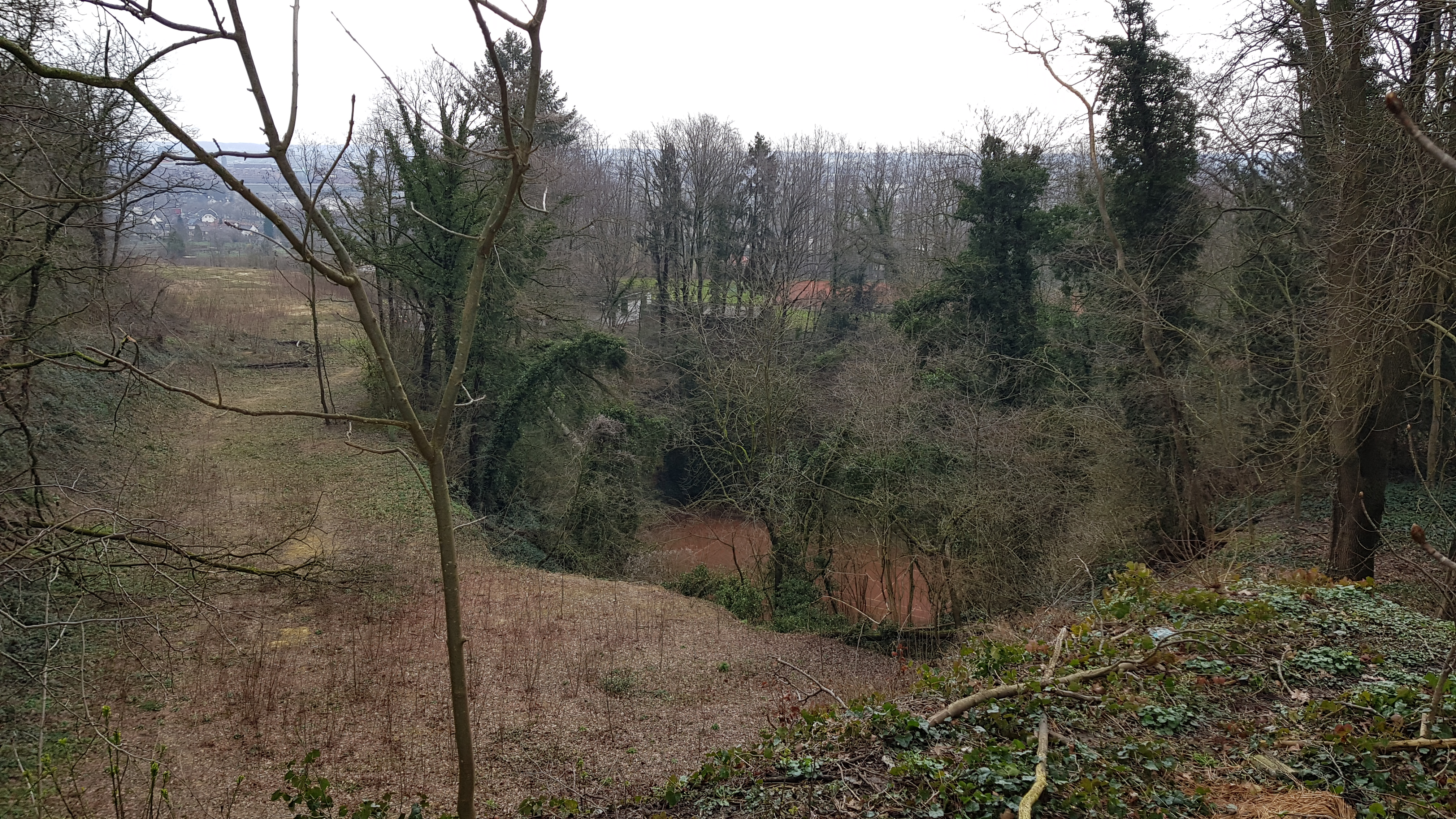 de tennisbaan van de EPV op de Sint-Pietersberg, Maastricht, Nederland